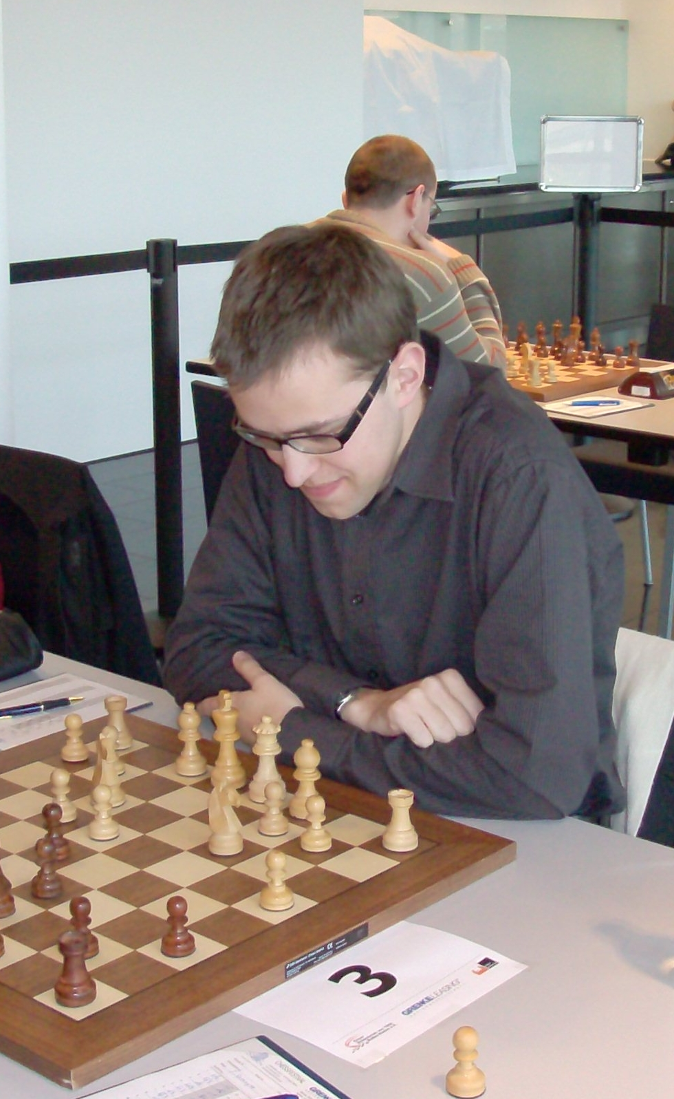 Jan Michael Sprenger, international master